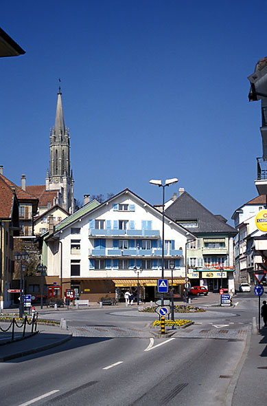 Un carrefour (Kreuzung) à Châtel-St-Denis